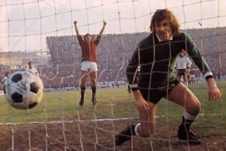 Lamberto Boranga trafitto da un rigore di Egidio Calloni in Cesena-Milan (2-1) del 18 gennaio 1976.